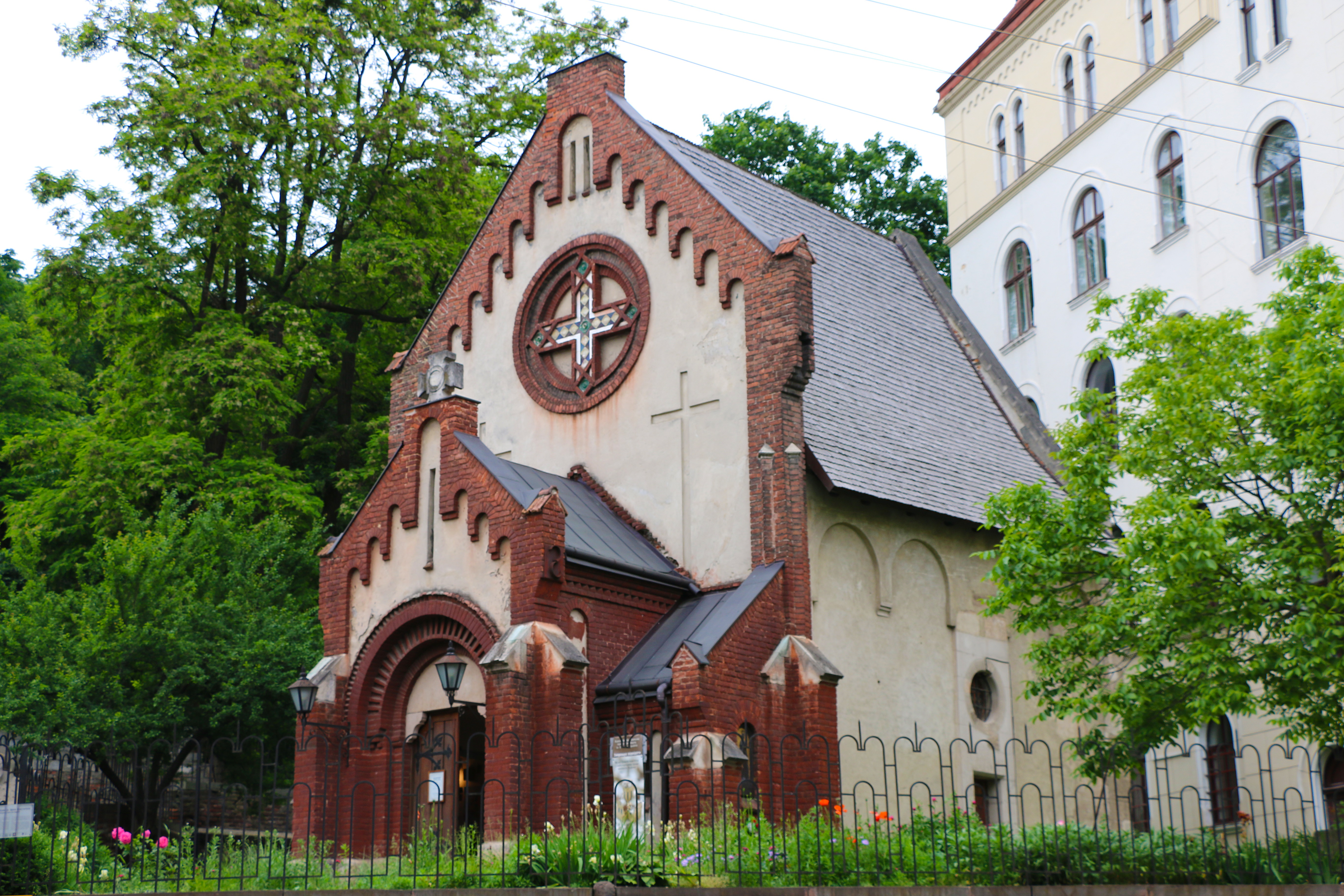 Музей археології (костел Івана Хрестителя), Львів, Ужгородська вул., 1